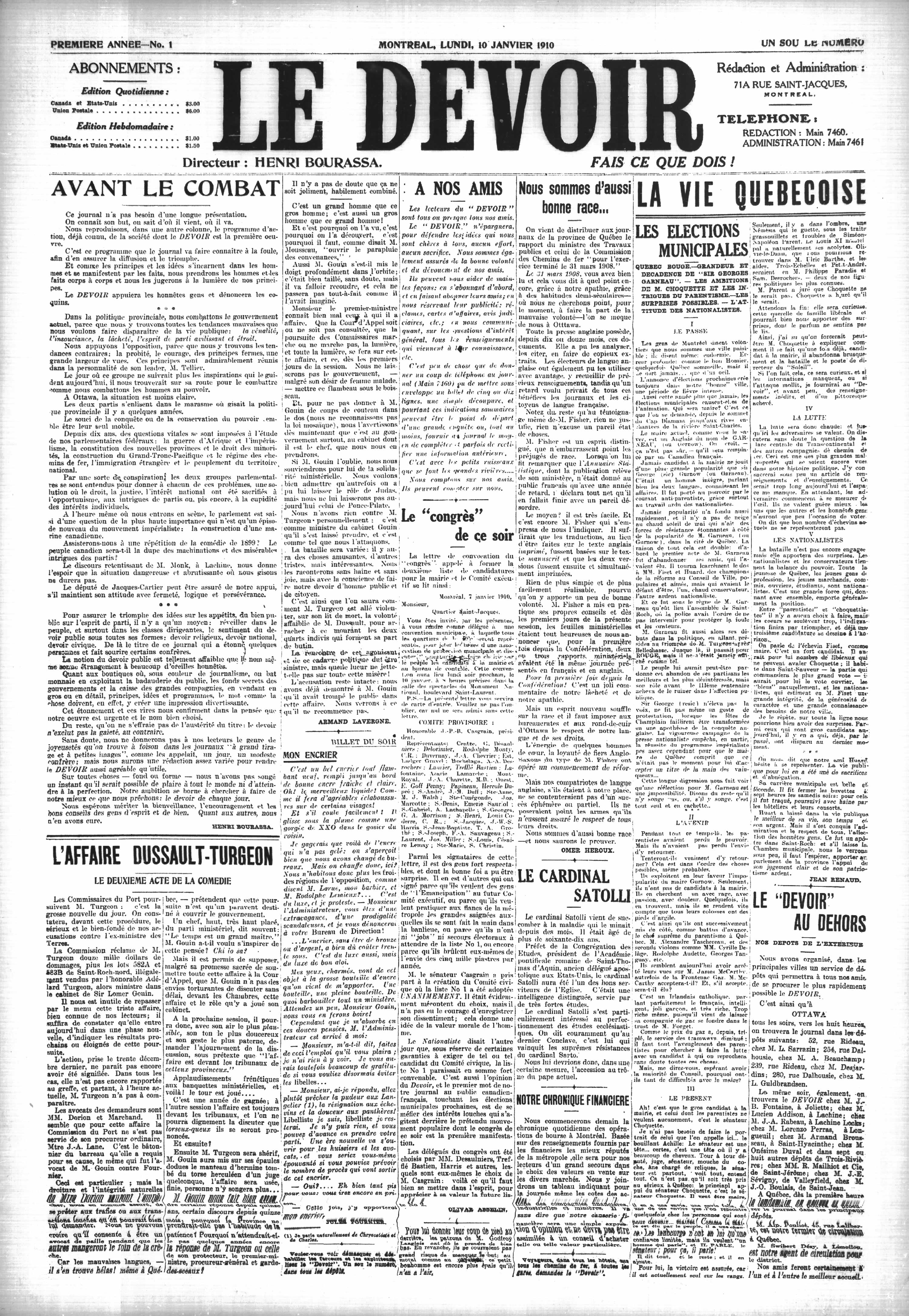 Première édition du journal montréalais « Le Devoir »